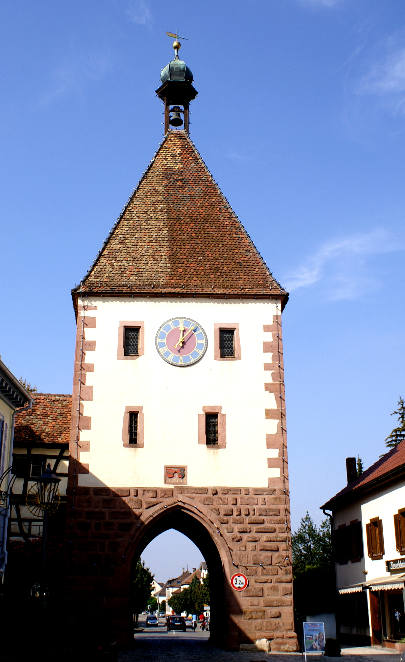 Königschaffhausener Tor aus dem 16. Jahrhundert in Endingen am Kaiserstuhl